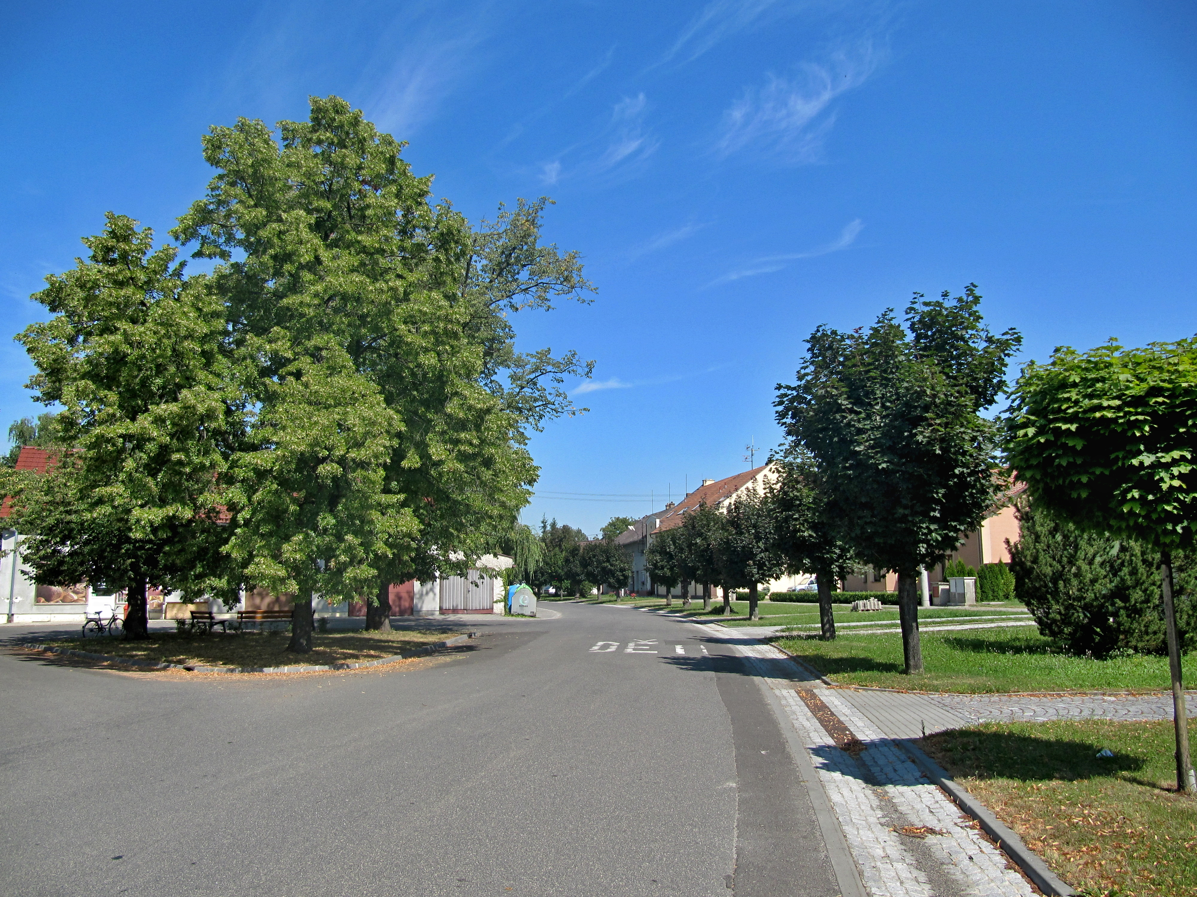 Žalkovice, okres Kroměříž, Česká republika.